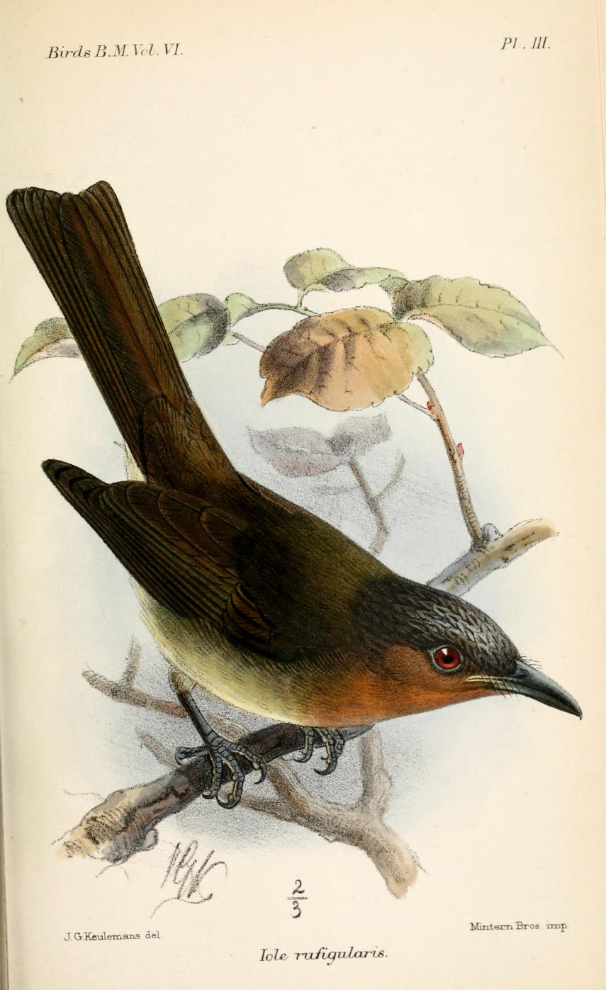 Iole rufigularis = Ixos rufigularis, Zamboanga Bulbul